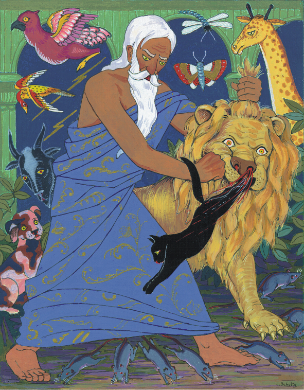 копия иллюстрации Льва Шульца к книге его же авторства "Как кошка пришла в этот мир". 1960-е